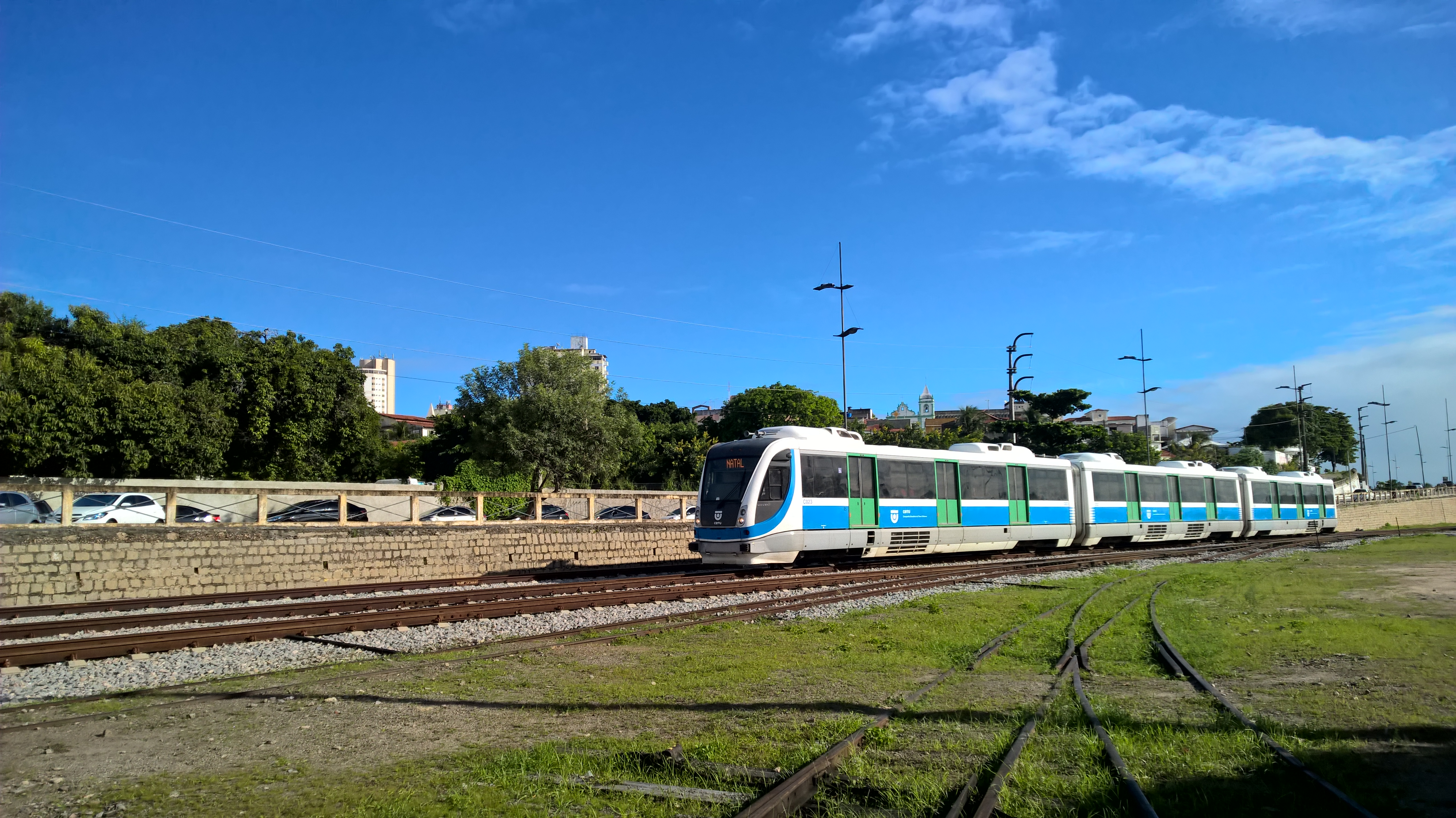 Veículo leve sobre trilhos(VLT) entrando no pátio da Estação Ribeira.